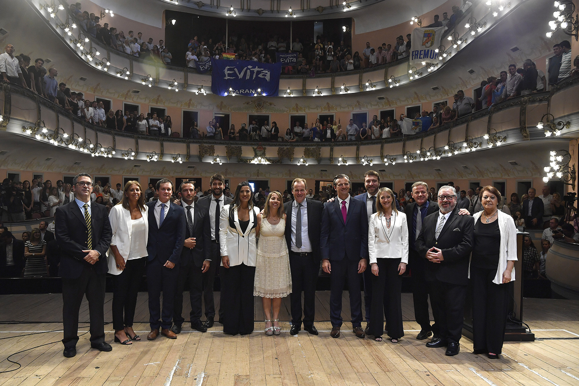 El Gobernador de la Provincia de Entre Ríos Gustavo Bordet junto al Intendente de la Ciudad de Paraná Adán Bahl y su Gabinete en el acto de asunción realizado el 11 de diciembre de 2019 en el Teatro Municipal "3 de Febrero" de Paraná.